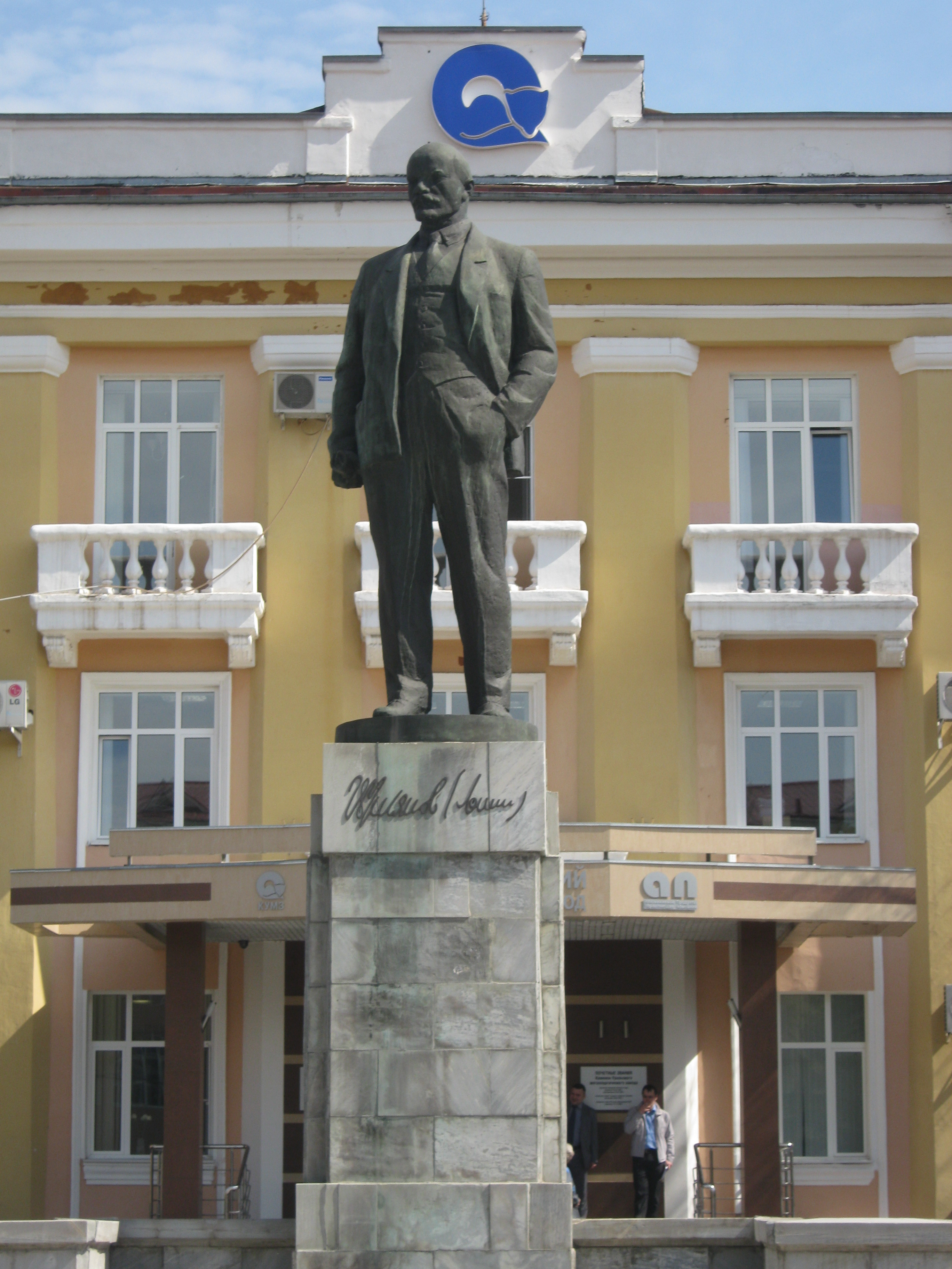 Памятник В.И. Ленина у заводоуправления КУМЗа